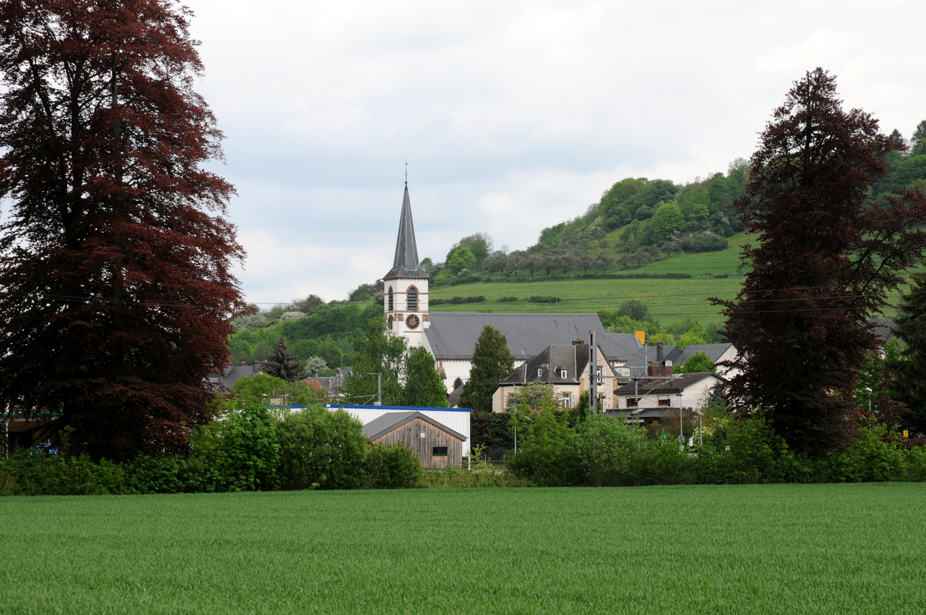 Schieren vu Biertrengaus gesinn.